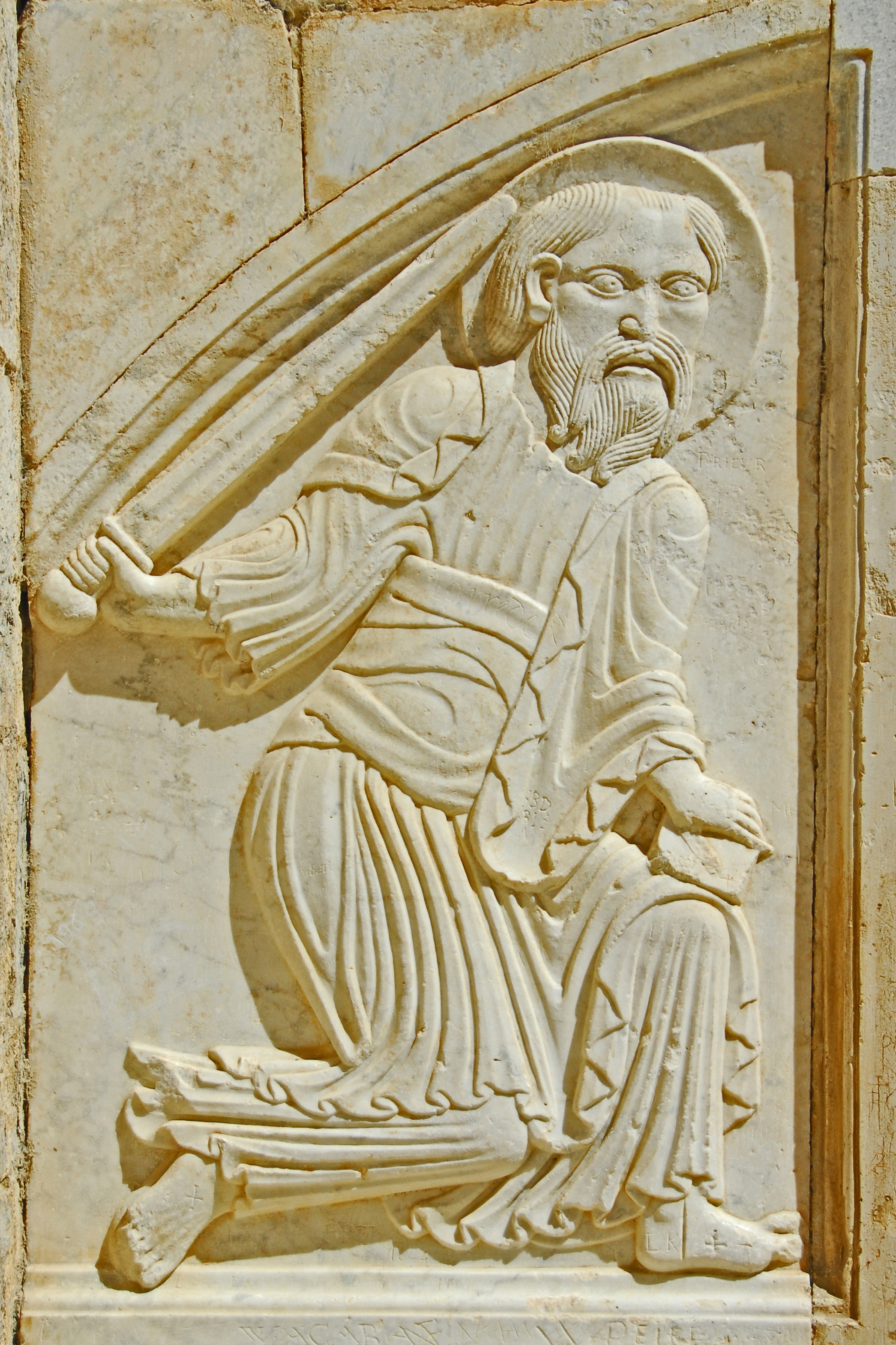 St-Pierre-et-St-Paul de Maguelone, Flachrelief Paulus